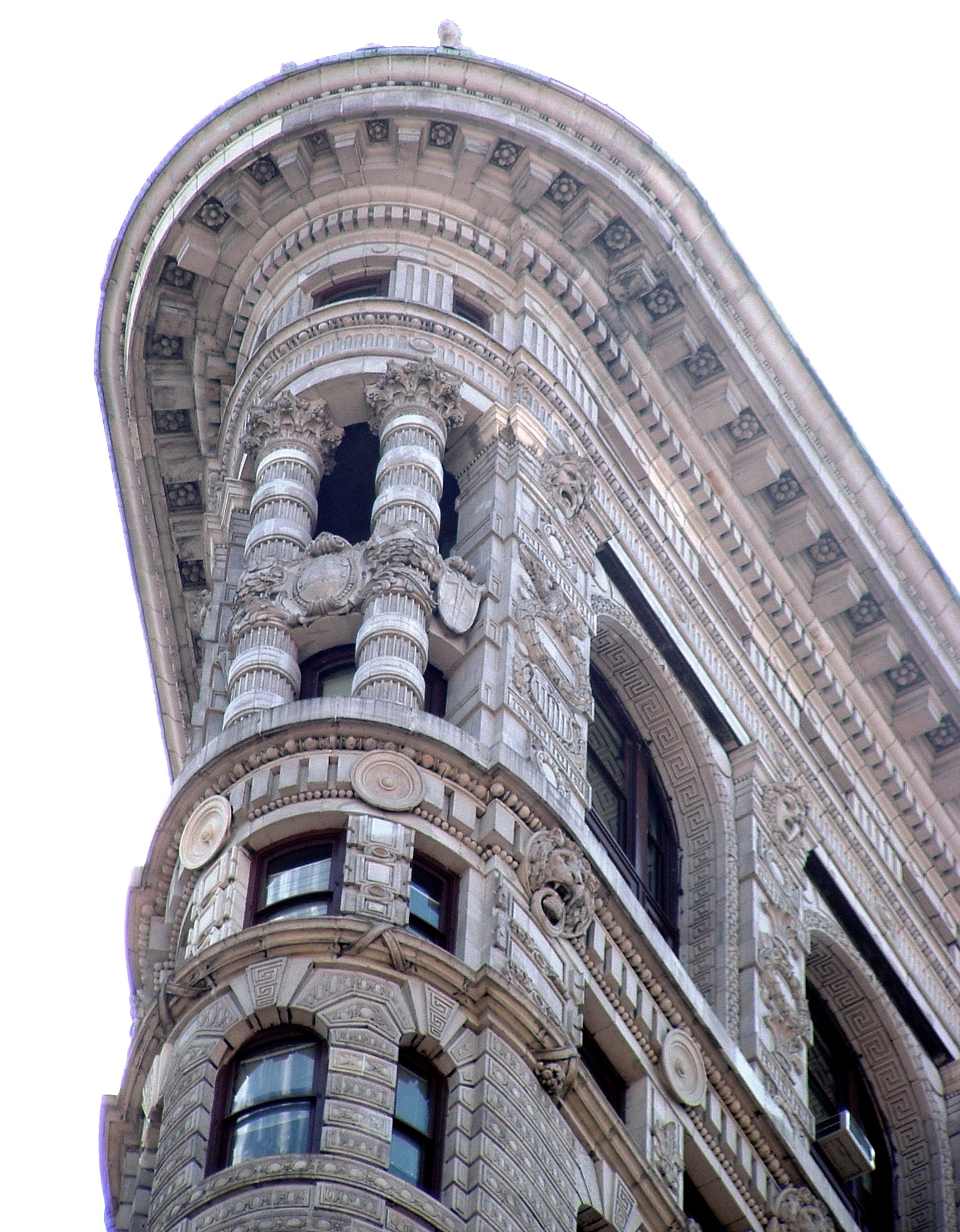 Detail van de gevel van het Flatiron Building